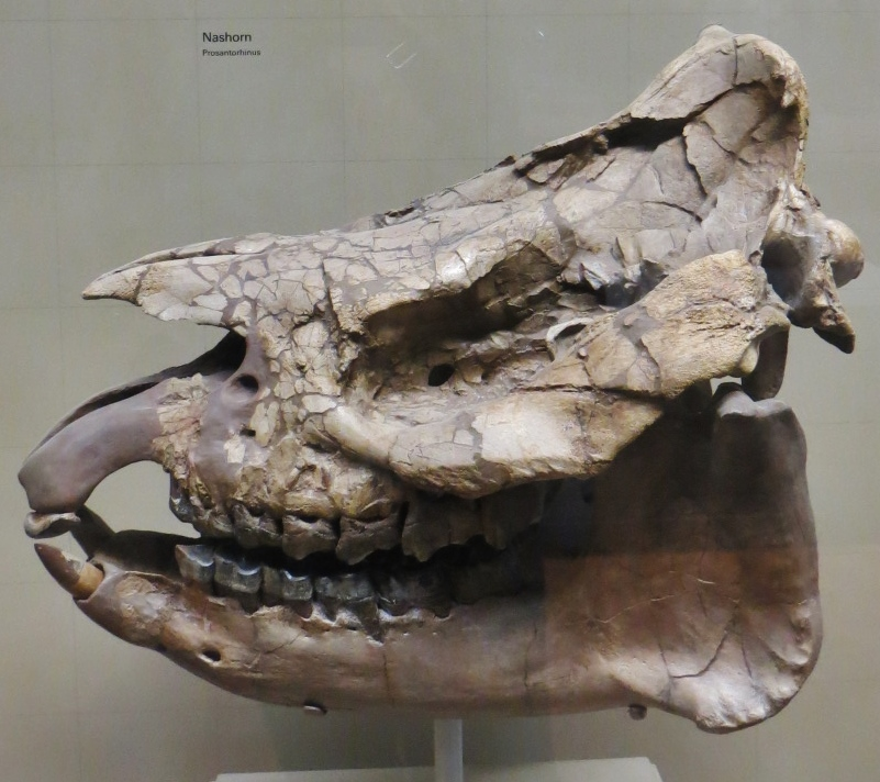 Fossil of Prosantorhinus- Took the picture at Museum am Lowentor, Stuttgart